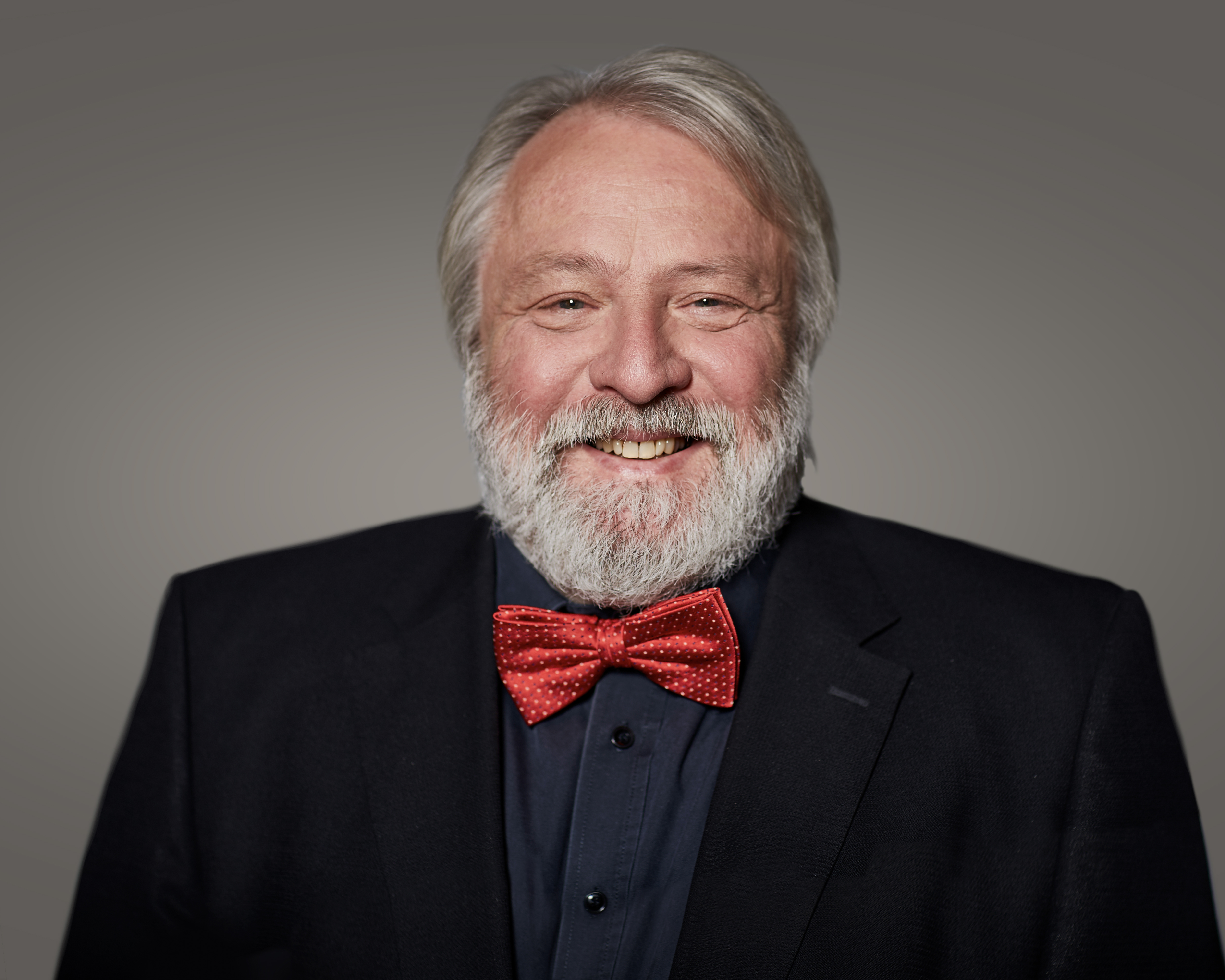 Evang. Kliniken Essen-Mitte Deutscher Krebspreisträger 2020 für exzellente klinische Forschung